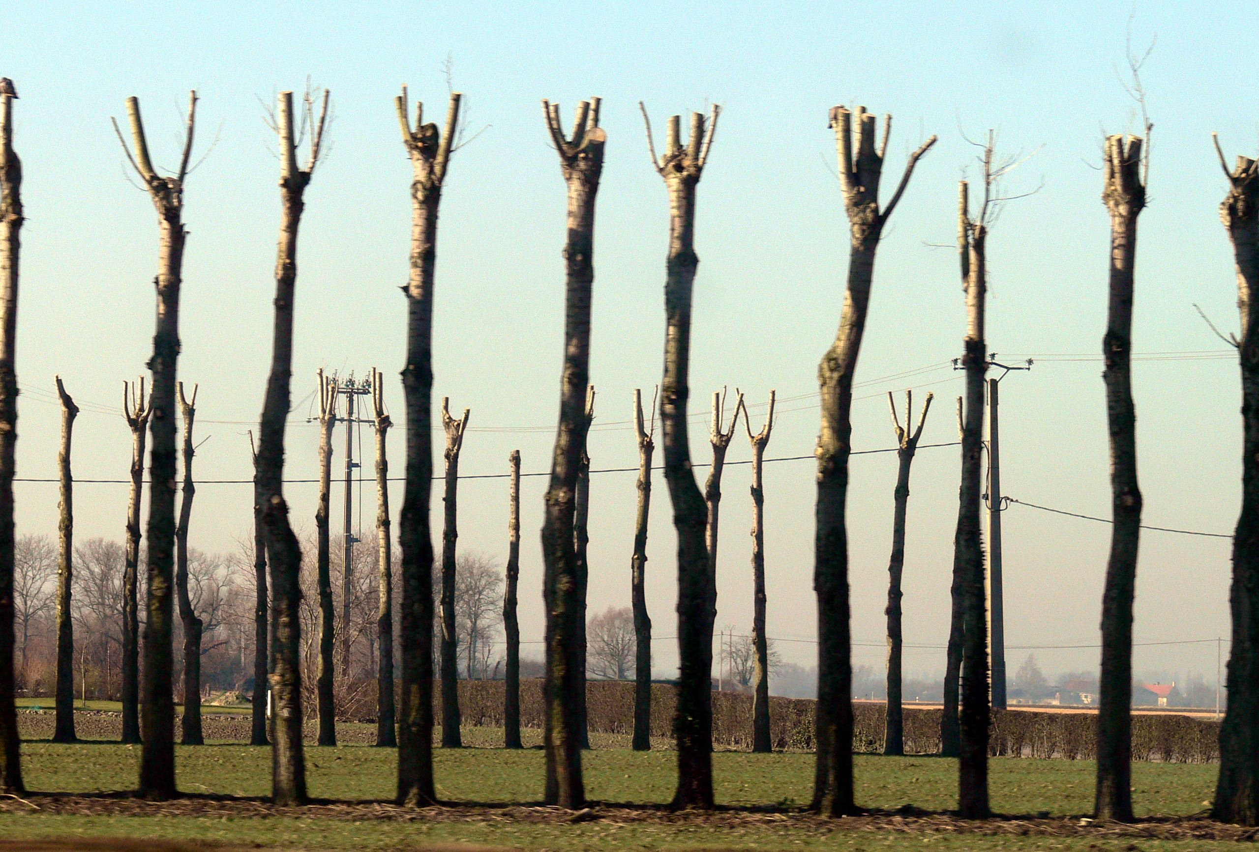 Arbres récemment émondés (émondage) , ici dans le nord de la France, en Flandre maritime.